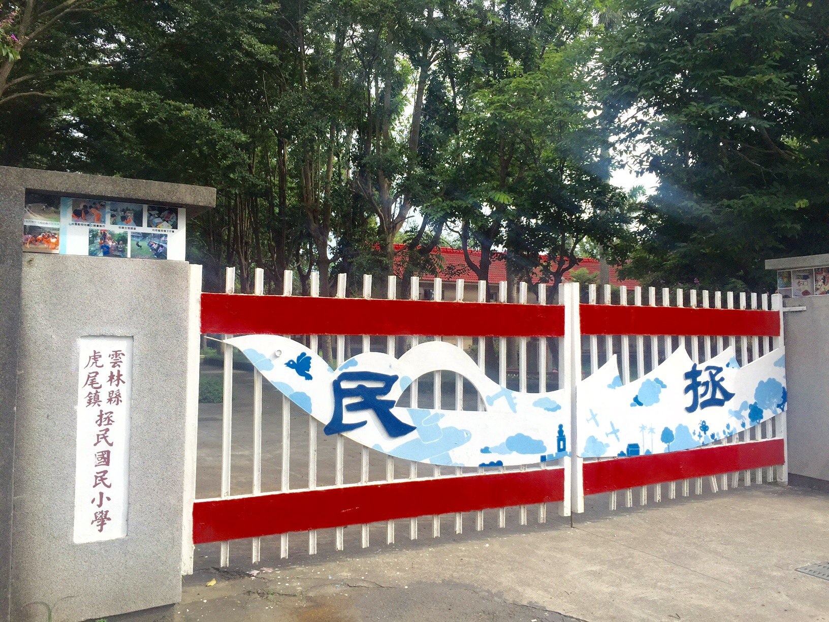 中文（台灣）: 拯民國小大門